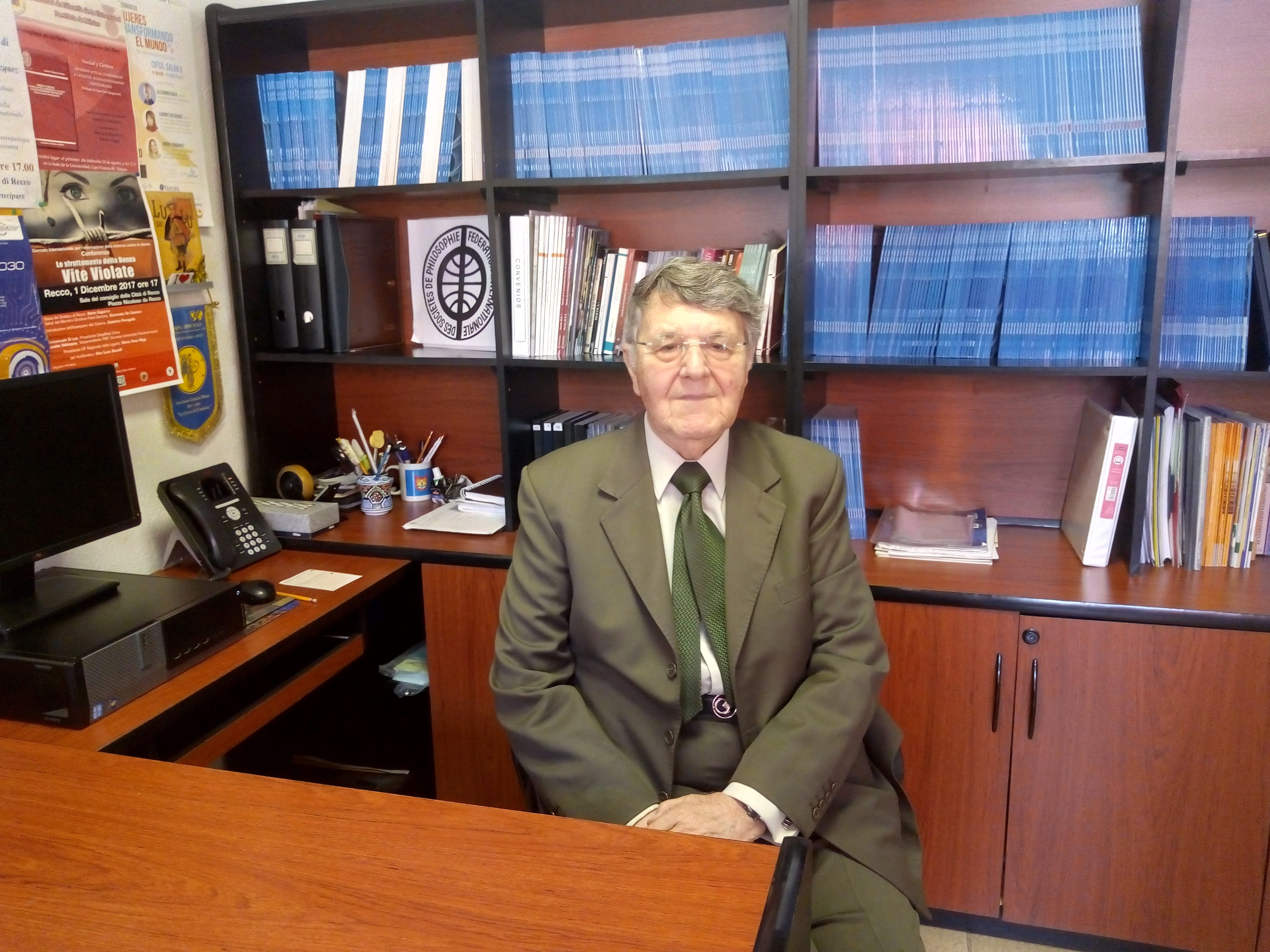 Dr. Evandro Agazzi en su oficina de la Universidad Panamericana, encargado del departamento de Bioética.